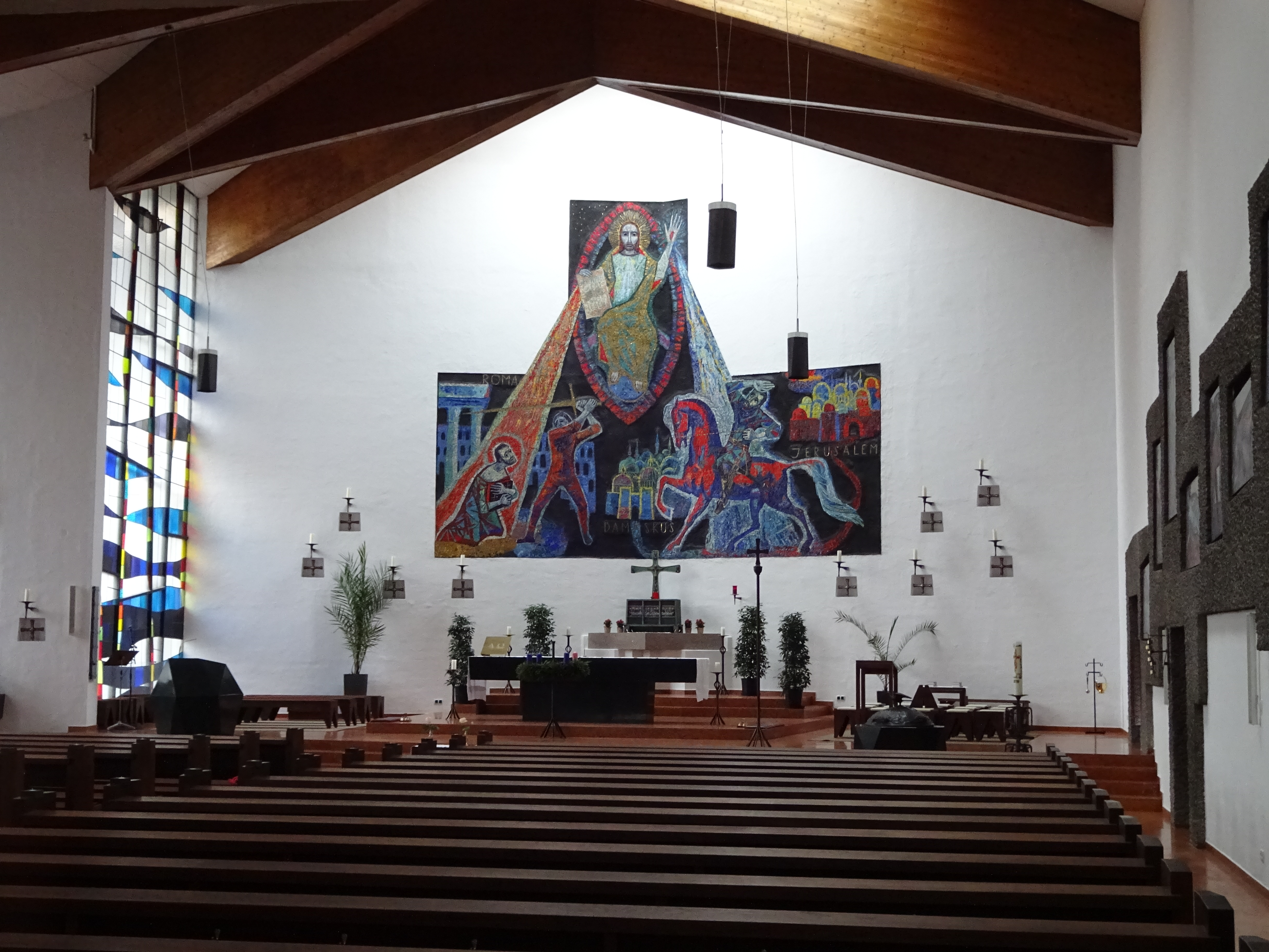 Pauluskirche, Innsbruck-Reichenau: Blick zum Altarraum (Altarmosaik mit Bekehrung und Hinrichtung des hl. Paulus von Max Spielmann) This media shows the remarkable cultural object in the Austrian state of Tyrol listed by the Tyrolean Art Cadastre with the ID 74345. (on tirisMaps, pdf, more images on Commons, Wikidata)